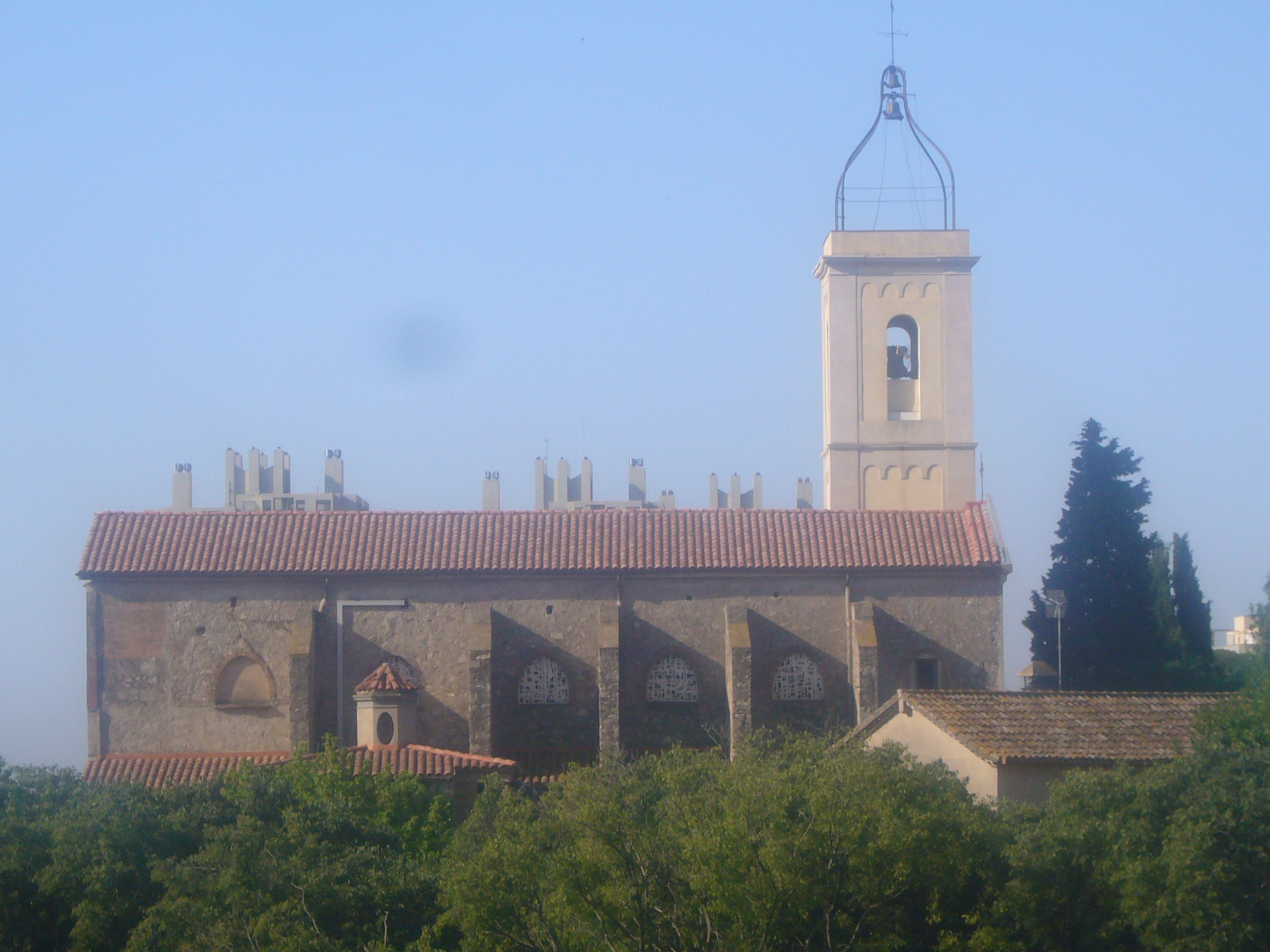 Església parroquial de Santa Magdalena, Esplugues